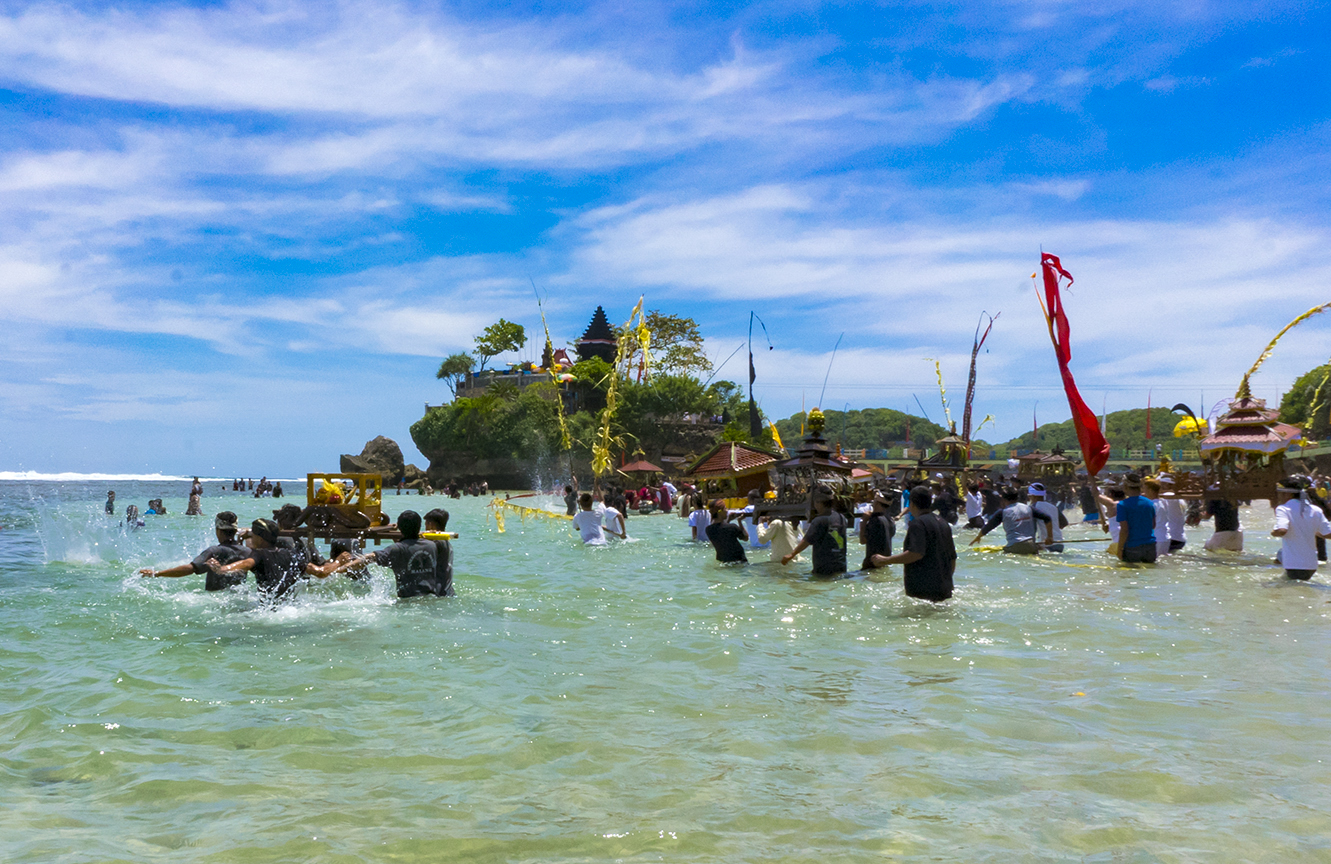 Tradisi Larung sesaji yang diadakan umat hindu Kab. Malang dengan melarung sesaji ketengah lautan di pantai balekambang Malang